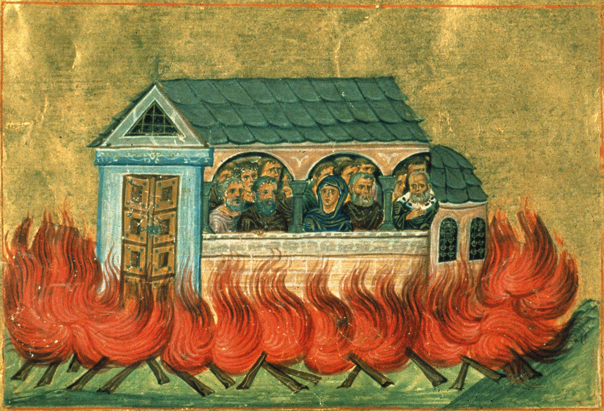 Мученики 20000, в Никомидии в церкви сожженные the 20,000 martyrs of Nicomedia, including: Glycerius, Zeno, Theophilus, Dorotheus, Mardonius, Migdonius, Indes, Gorgonius, Peter, Euthymius, and the virgins Agape, Domna, and Theophila Константинополь. 985 г. Миниатюра Минология Василия II. Ватиканская библиотека. Рим.